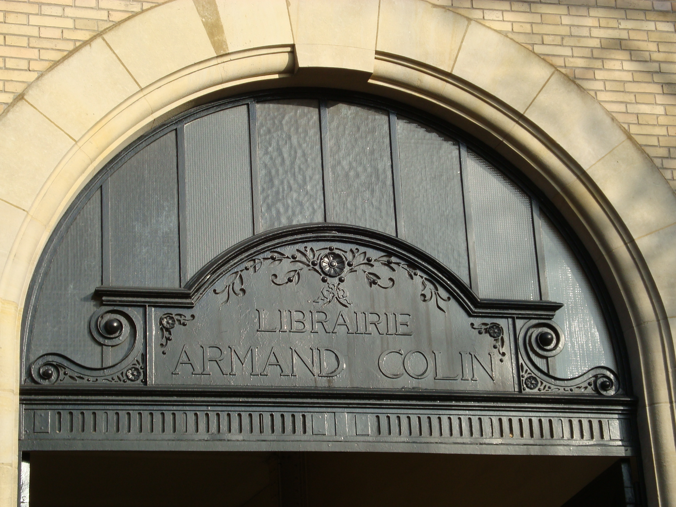 Fronton des éditions Armand Colin, rue de l'Abbé de l'épée